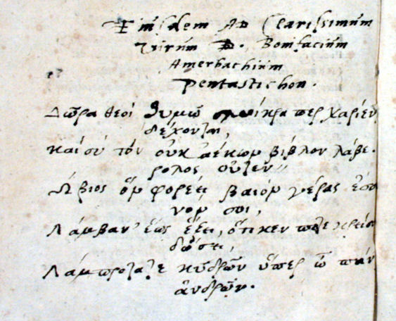 Griechisches „Pentastichon“ des Karl von Utenhove (siehe: „Οὐθὲν ὁ βίος“, Zeilen 8/9) als Widmung an Bonifacius Amerbach. In: Paul Dolscius: Δαβίδου προφήτου καὶ βασιλέως μέλος / Psalterium prophetae et regis Davidis, Basel: Johannes Oporinus 1555